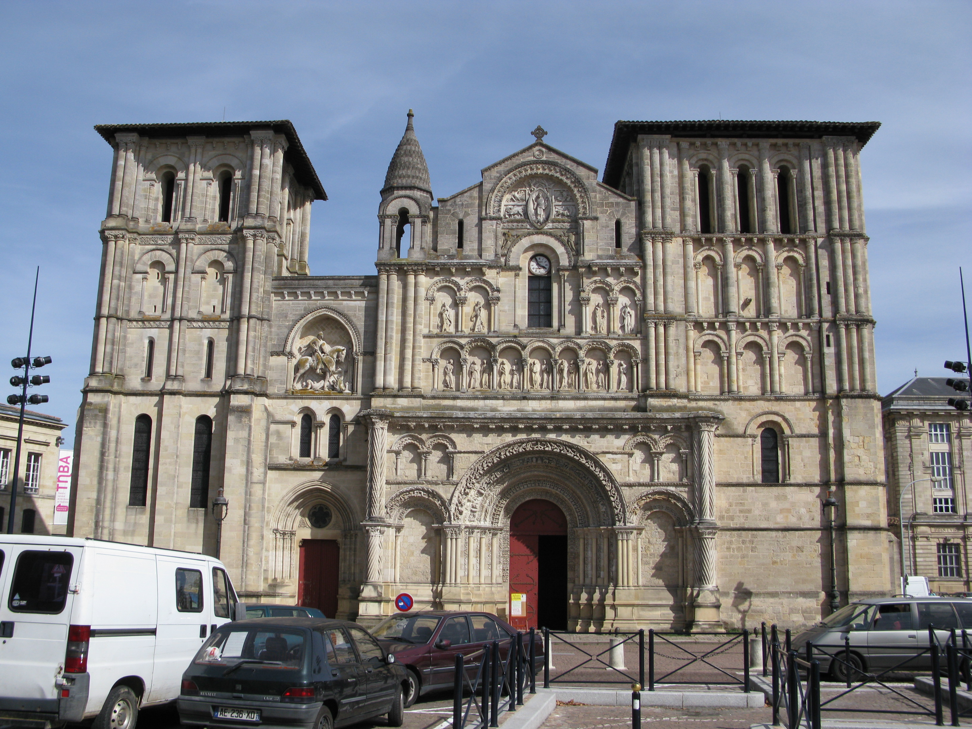 La façade de l'église Sainte-Croix à Bordeaux, en septembre 2010